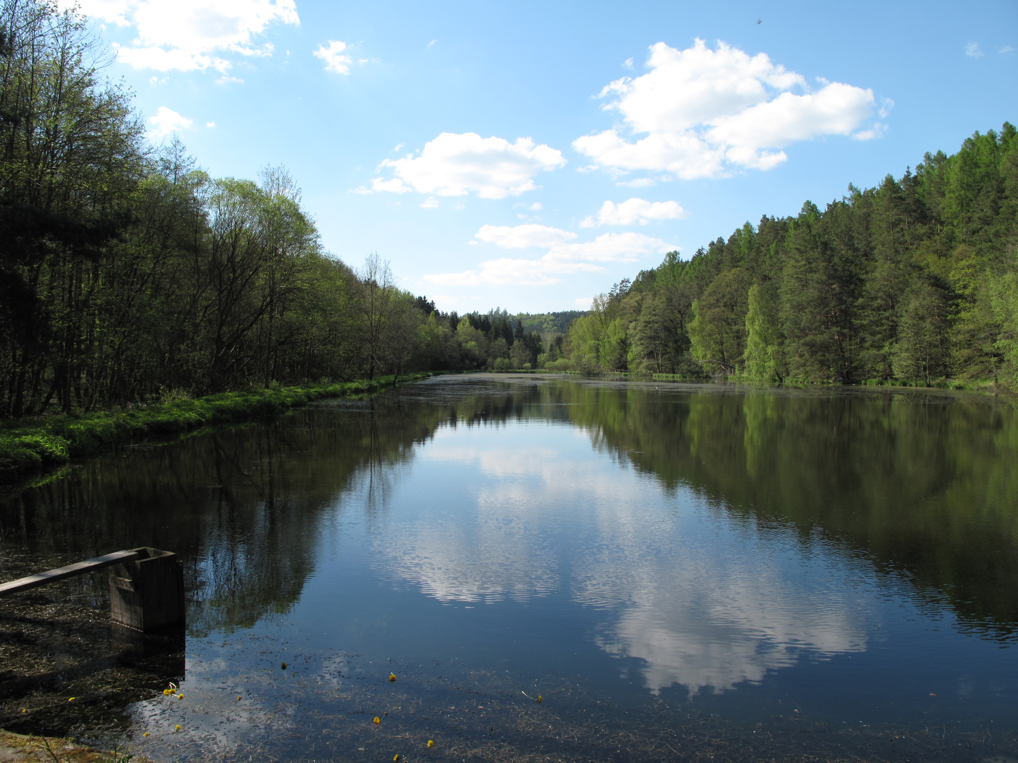 Rybník Šáchovec na Jevanském potoce. Okres Praha-východ, Česká republika.